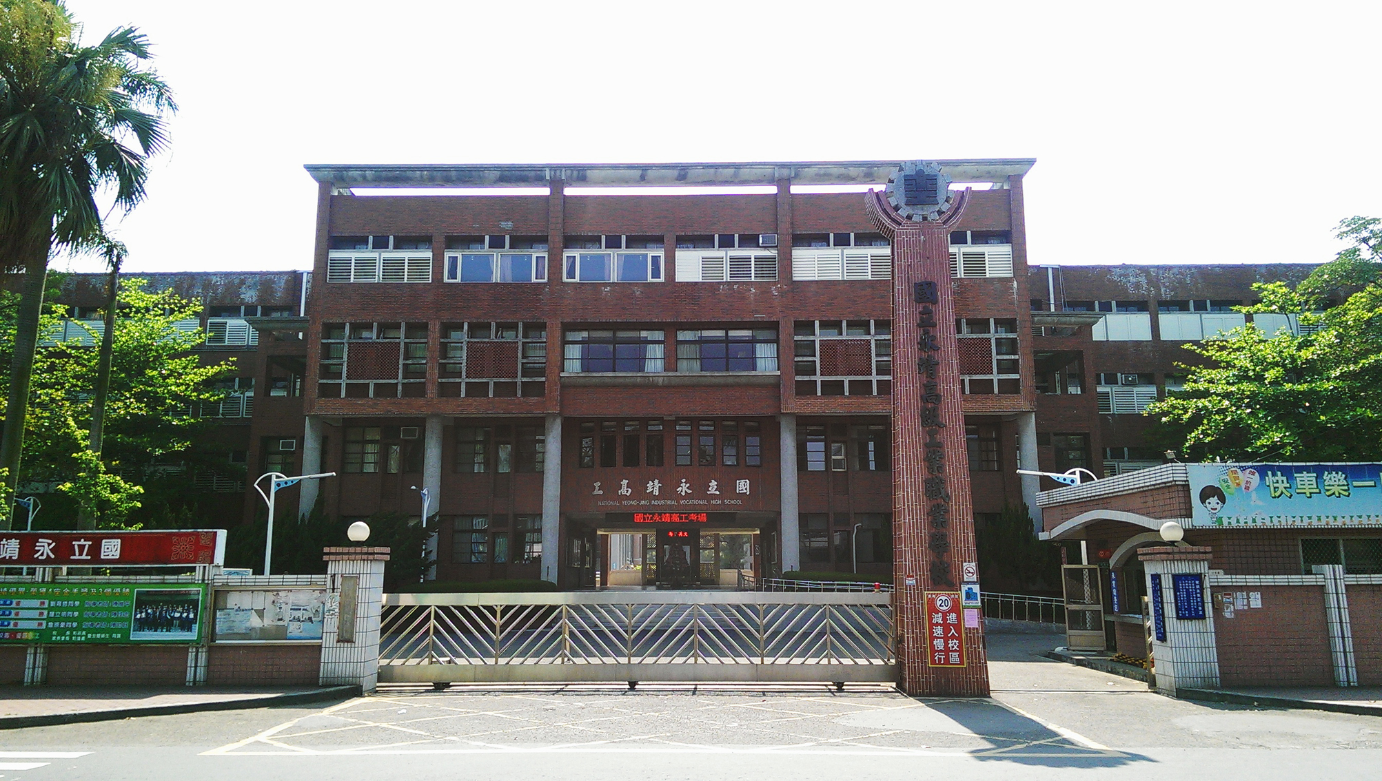 中文（台灣）: 國立永靖高工